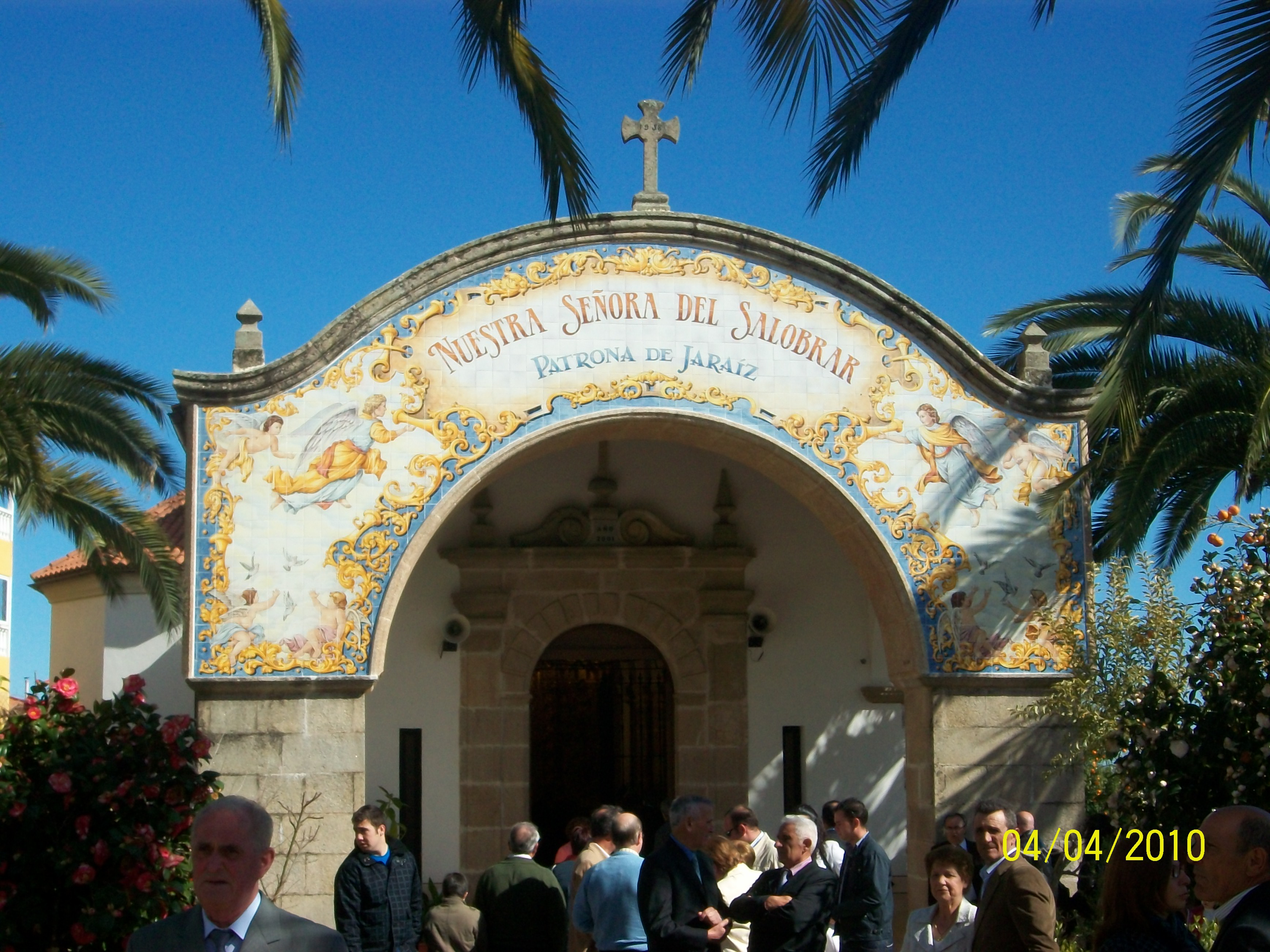 Mosaico de Entrada a la Ermita de Nuestra Señora del Salobrar